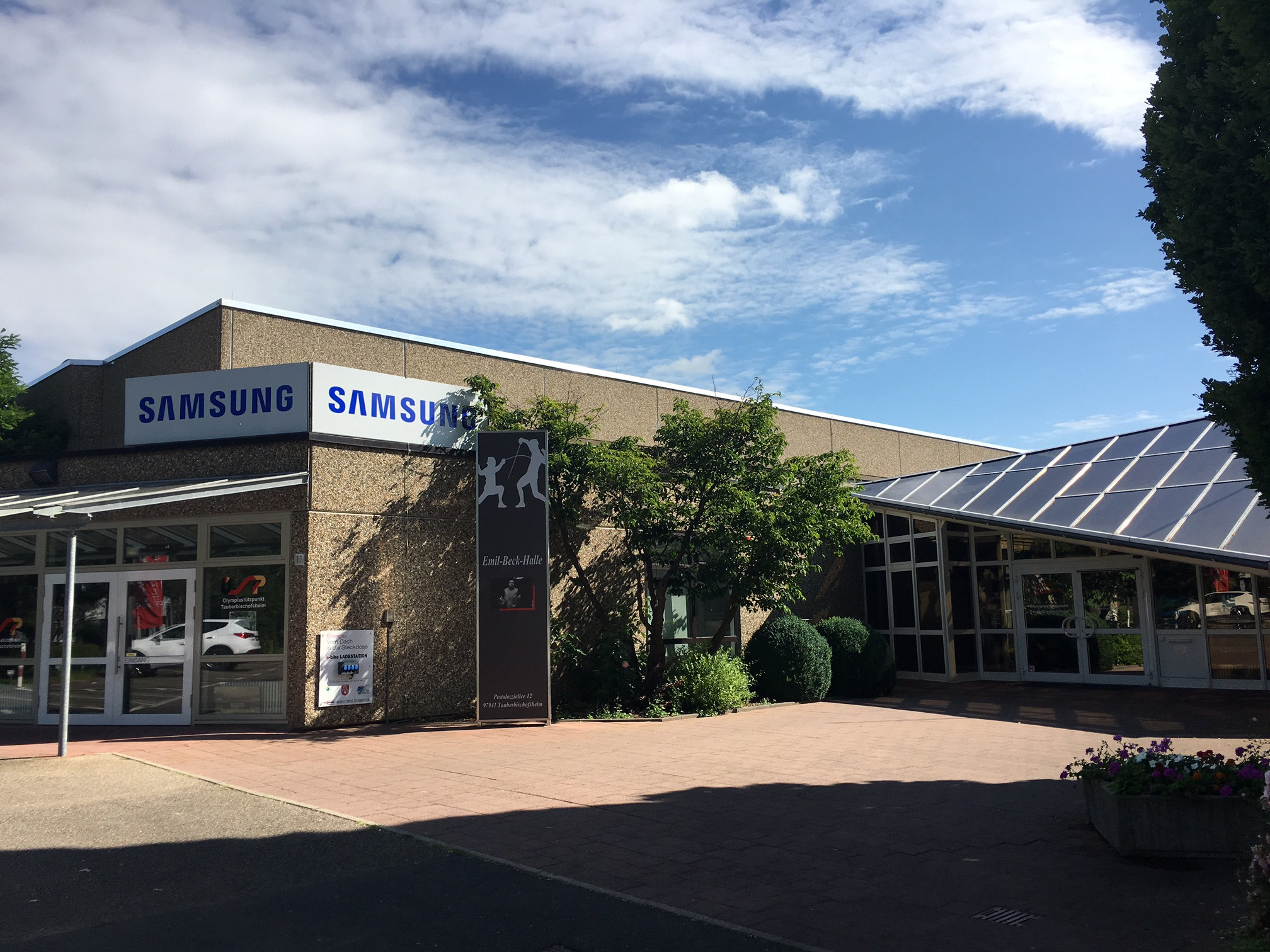 Emil-Beck-Halle Tauberbischofsheim